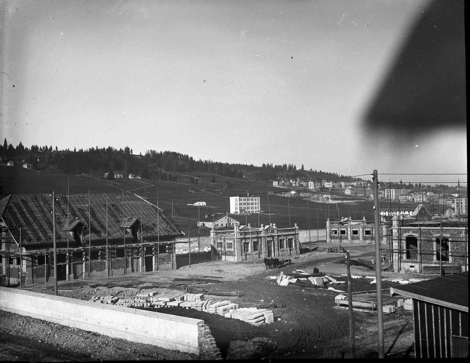 Les nouveaux abattoirs en construction, La Chaux-de-Fonds, 1904.Plaque de verre négative noir-blanc, 8x12cm. Bibliothèque de la Ville de La Chaux-de-Fonds, Département audiovisuel. Fonds Musée Musée d'Histoire de La Chaux-de-Fonds, MH-PVN-516.